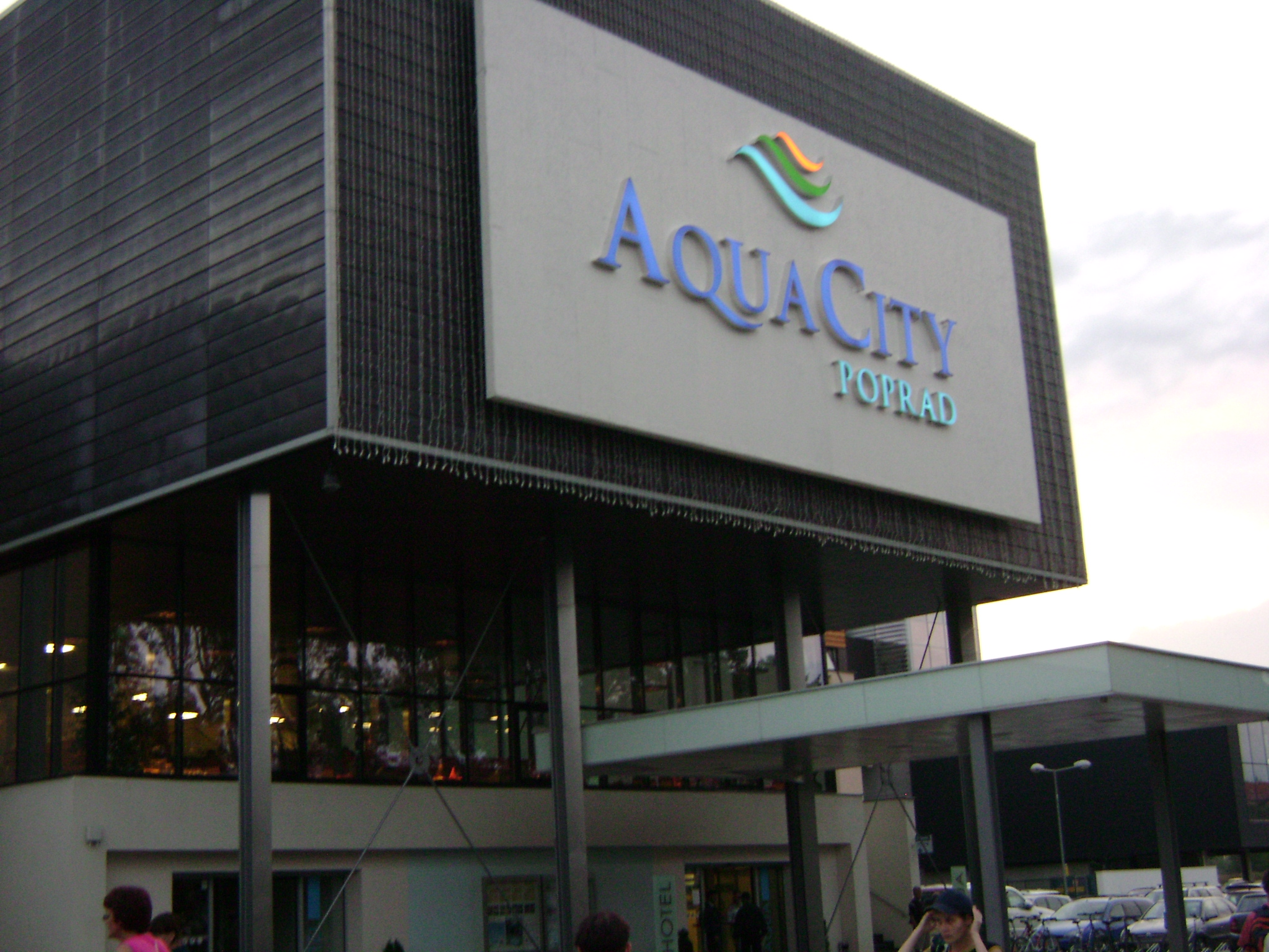 Aqua City in Poprad, Slovakia